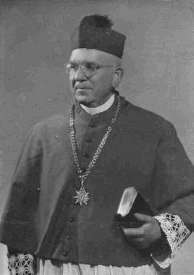 Václav Slavík (1986 - 1965), Český římskokatolický kněz.